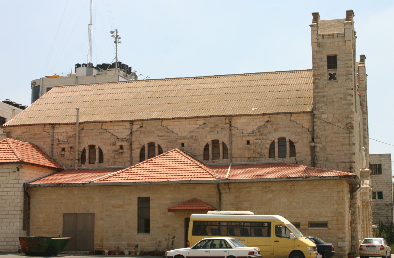 Ramallah, Palästina.